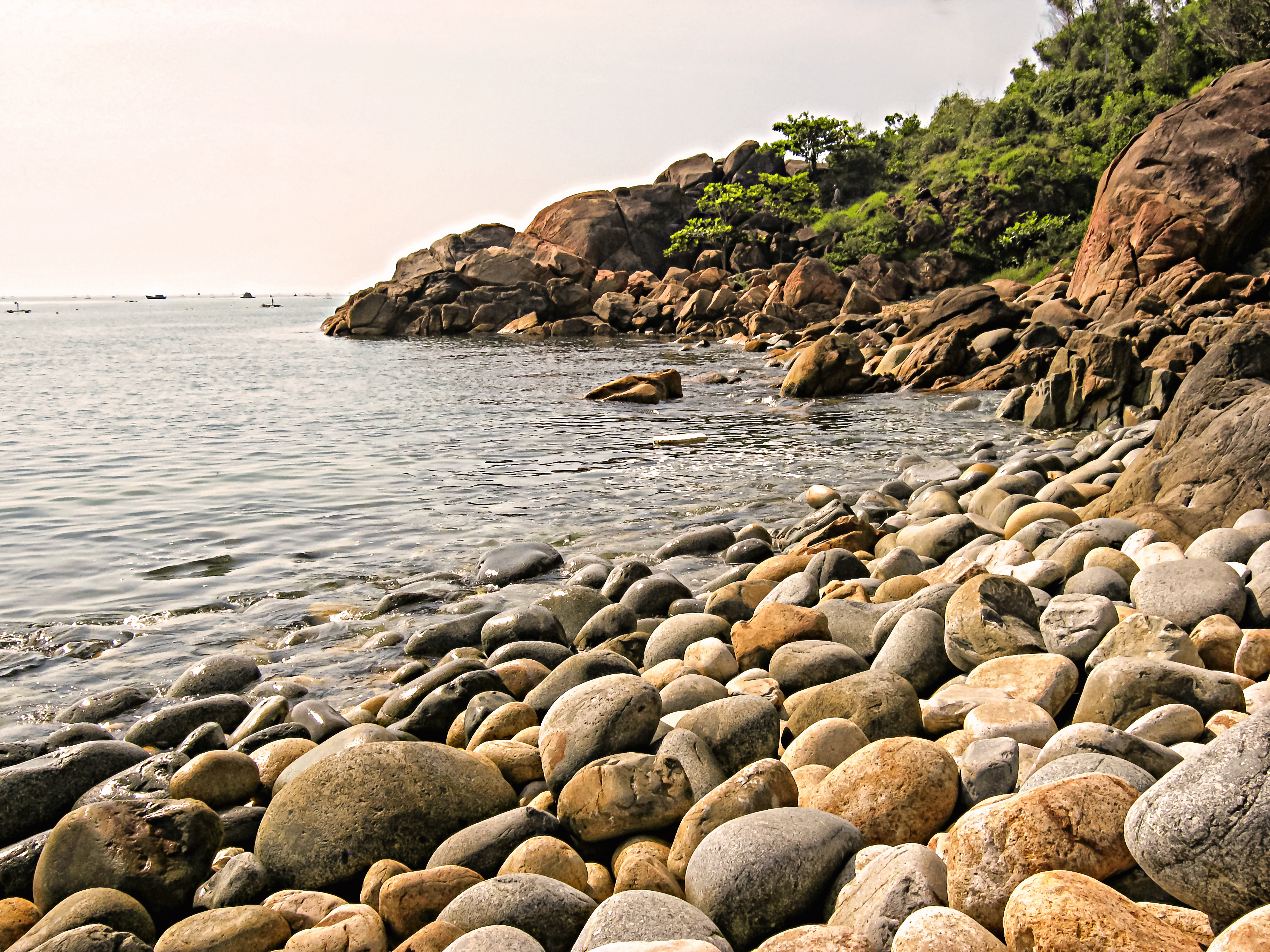 Bãi Đá Trứng tại Gành Ráng Tiên Sa, một thắng cảnh của Quy Nhơn (Bình Định, Việt Nam).